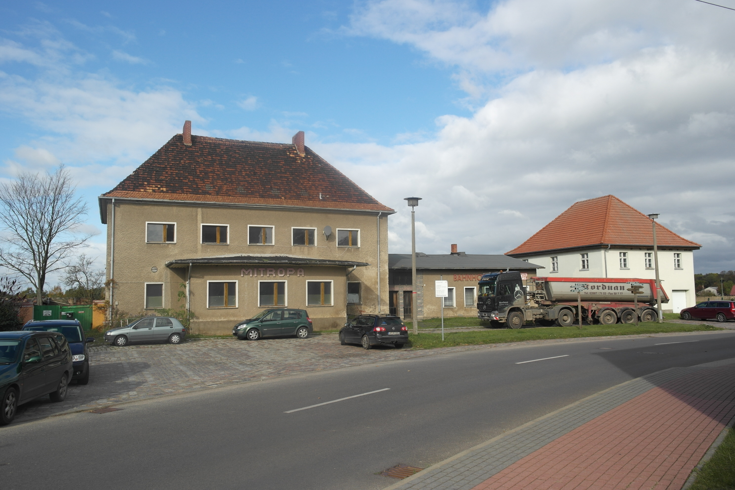 Bahnhof Tantow, Vorplatz mit dem früheren Empfangsgebäude (links) und dem Zollgebäude (rechts)